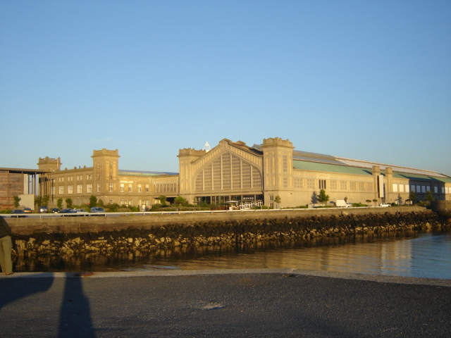 Photographie de la gare transatlantique de Cherbourg.